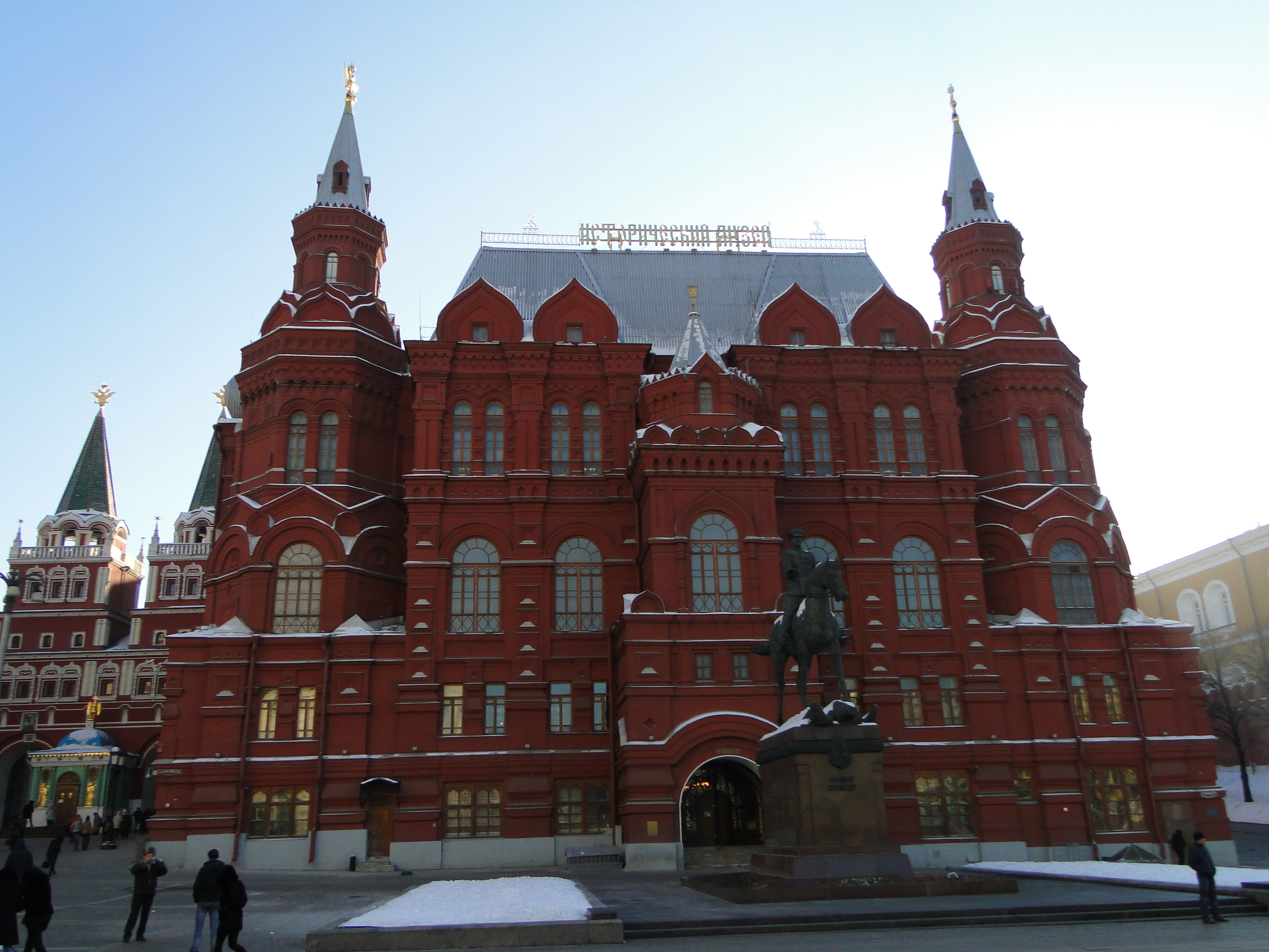 Государственный исторический музей